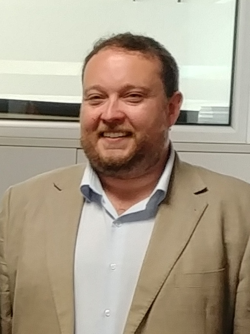 Debate en la Cope en Cantabria con los números uno al Congreso de los Diputados por Cantabria: Diego Movellán (PP), Luis Santos Clemente (PSOE), Luis del Piñal (Unidas Podemos), Rubén Gómez (Ciudadanos) y José María Mazón (PRC).